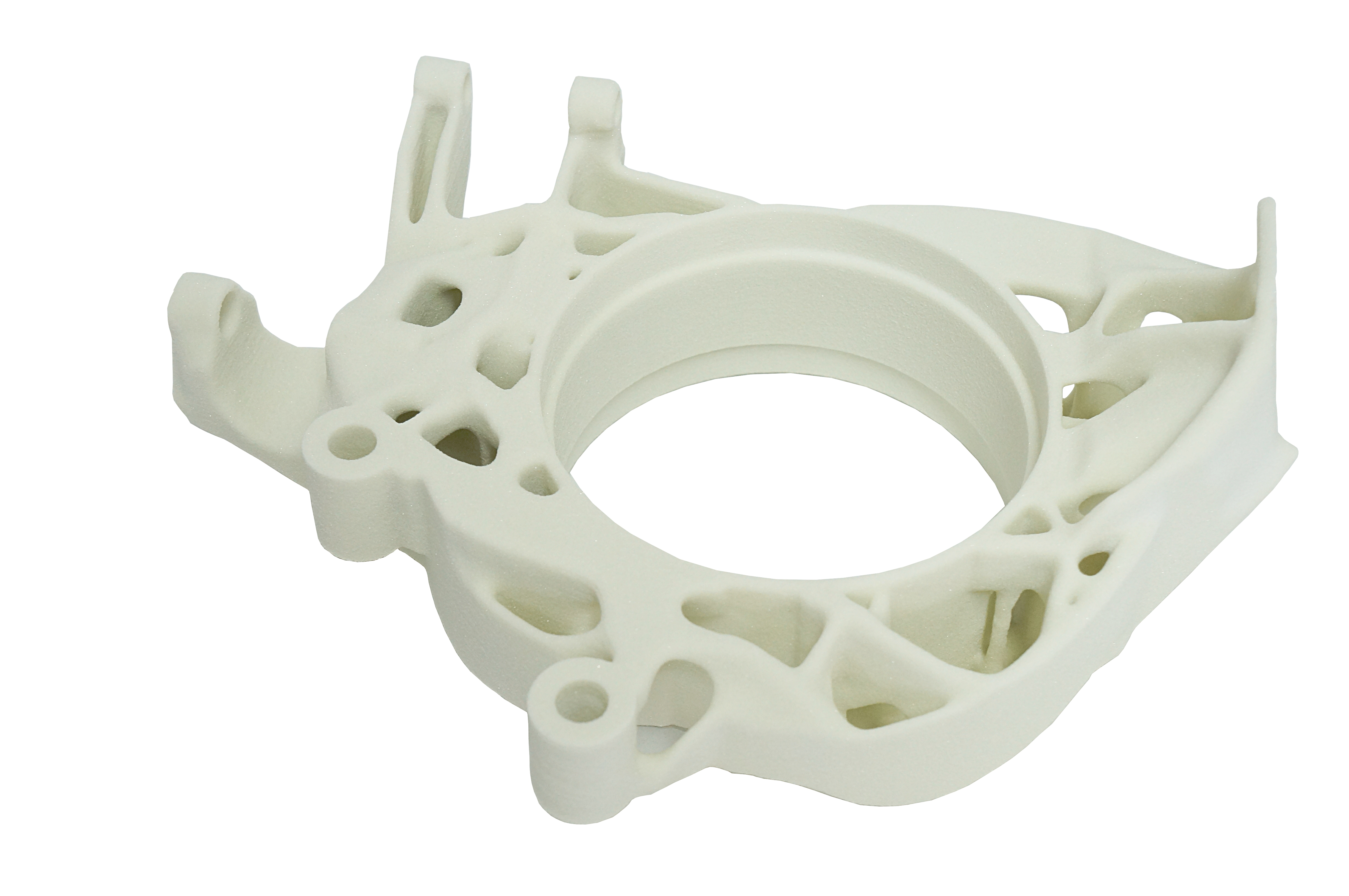 Darstellung eines durch 3D-Druck optimierten Radträgers